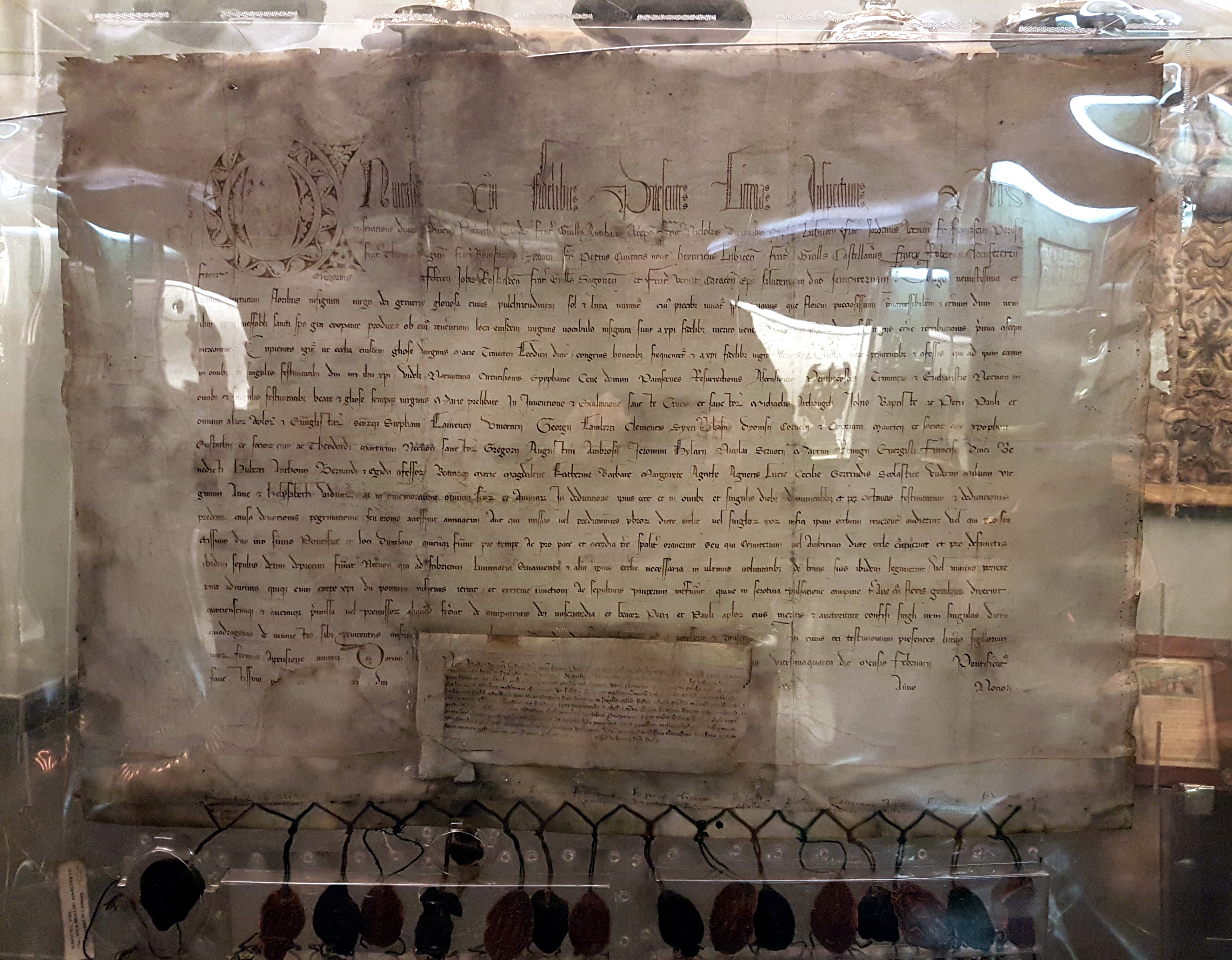 Middeleeuwse oorkonde in de schatkamer van de Onze-Lieve-Vrouwebasiliek in Maastricht. Akte waarbij een aantal bisschoppen een aflaat van veertig dagen verleent aan degenen die de kerk van Onze-Lieve-Vrouw onder bepaalde voorwaarden bezoeken. Met akte van bekrachtiging door de bisschop van Luik, 1325.